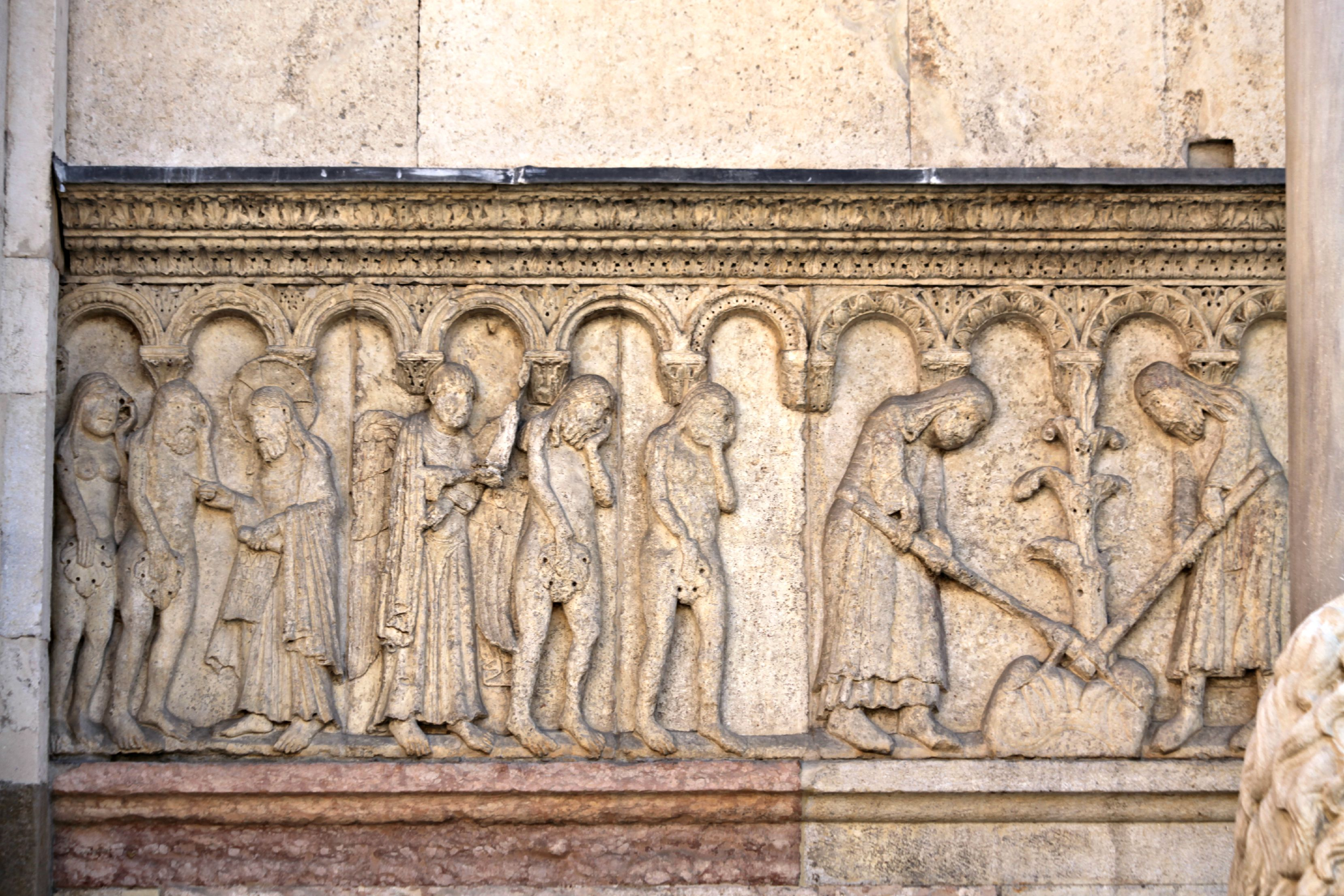 Duomo (solo esterni) This is a photo of a monument which is part of cultural heritage of Italy.